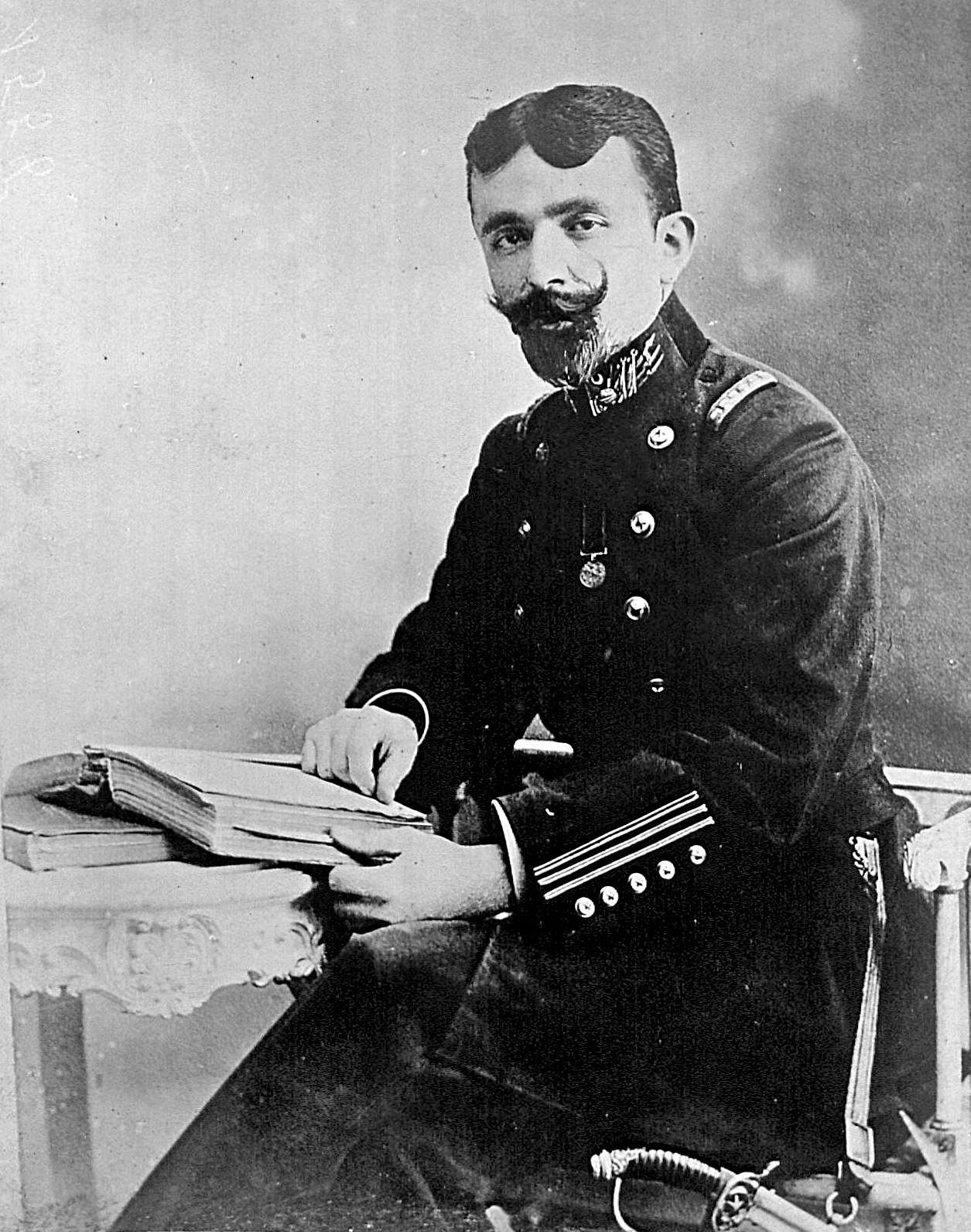 Enver Pascha